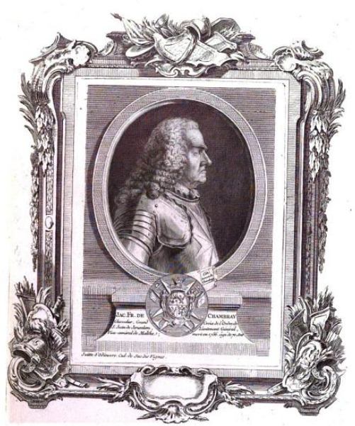 Das Bild zeigt Jaques-Francois De Chambray (*15. März 1687 in Evreux, † 8. April 1756 auf Malta), Großkreuz-Ritter des Malteserordens, französischer Admiral, Vizeadmiral im Dienst des Malteserordens, Lieutenant-General